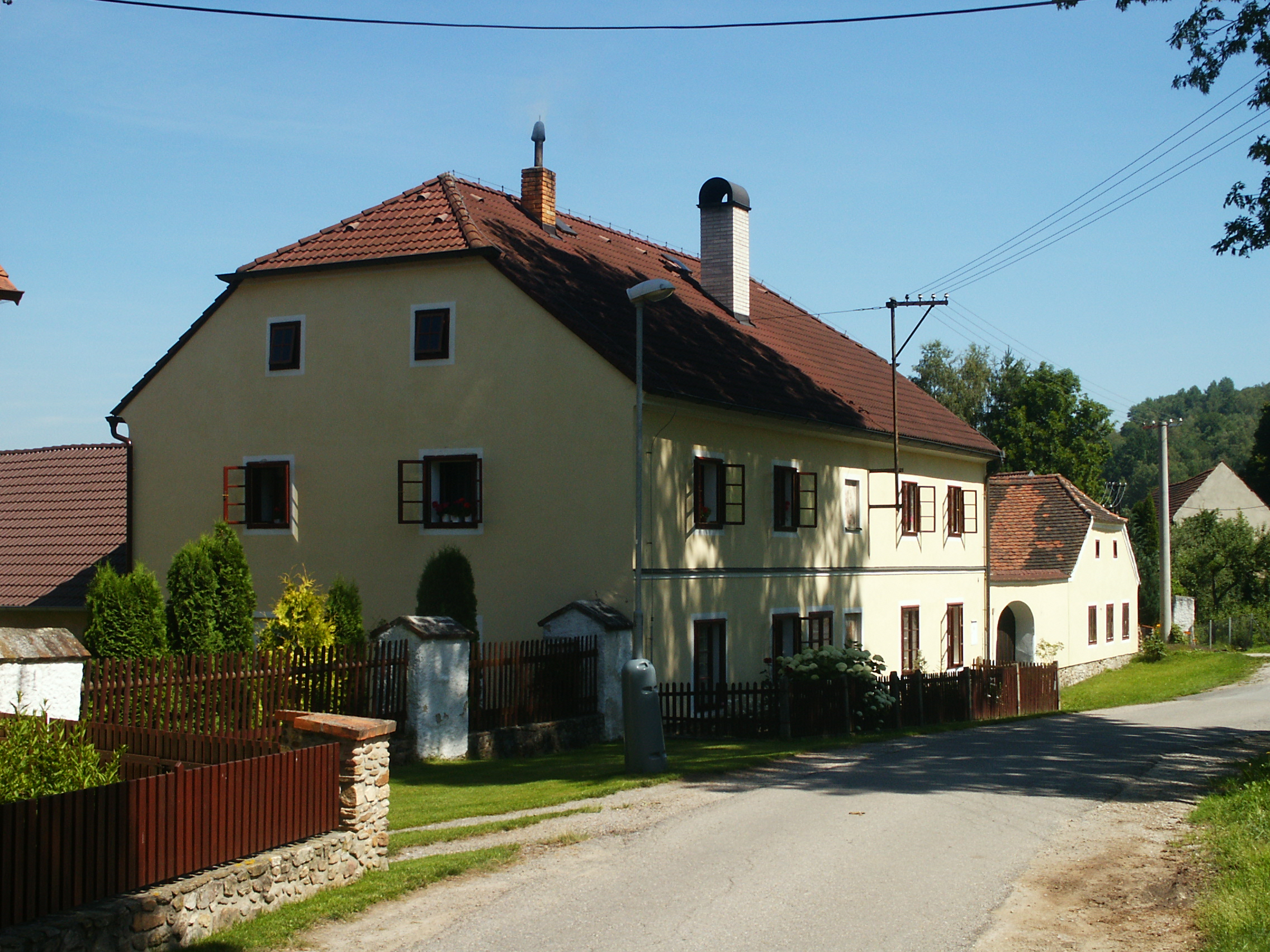 Slupenec - č.p. 4